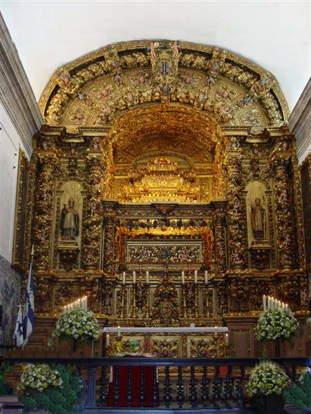 Foto: Jose Goncalves A Capela de S. Geraldo na Sé de Braga.